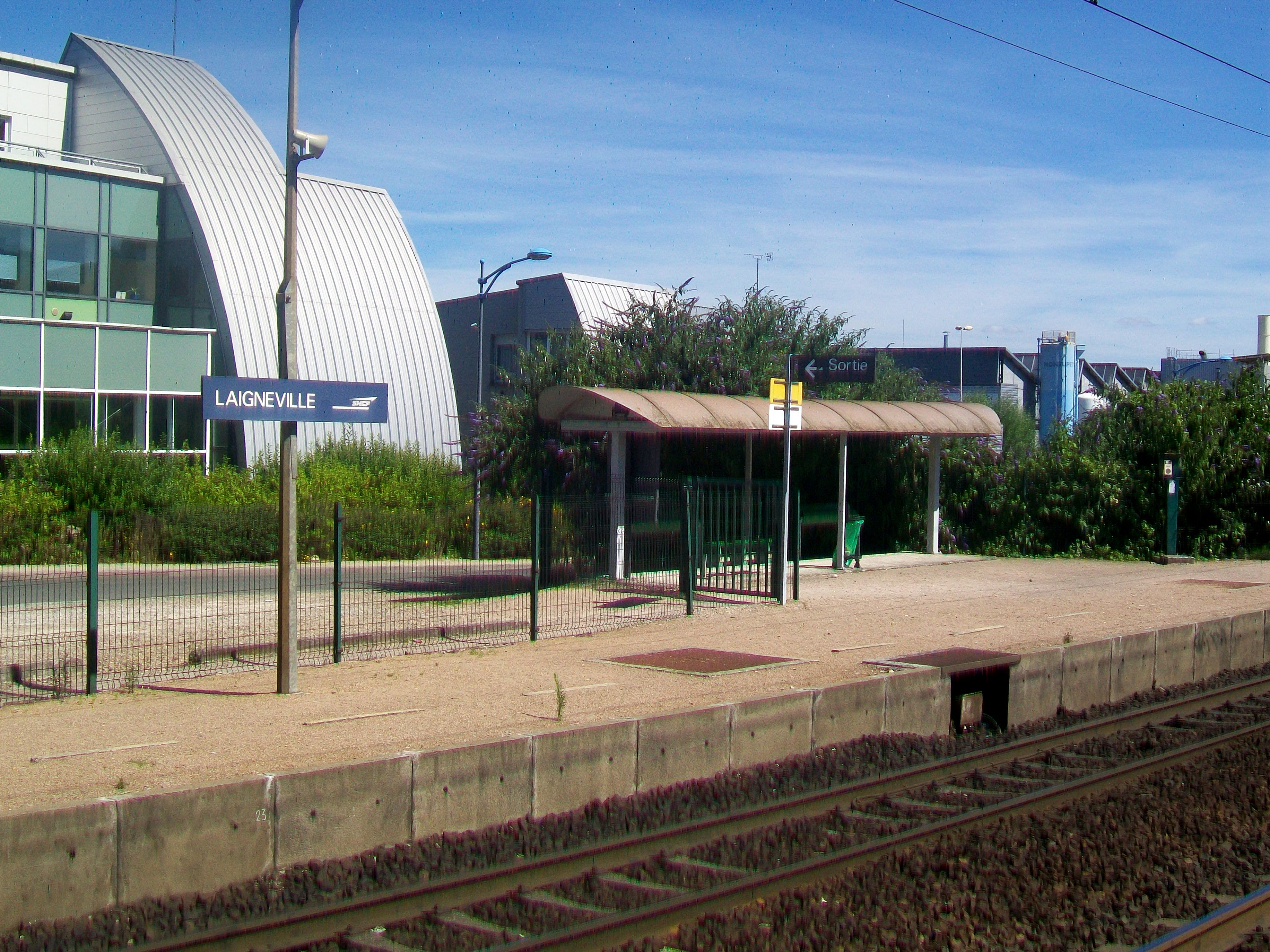 L'arrêt SNCF, quai de la voie 2 en direction de Paris (côté opposé au village). L'accès se fait par le passage à niveau.